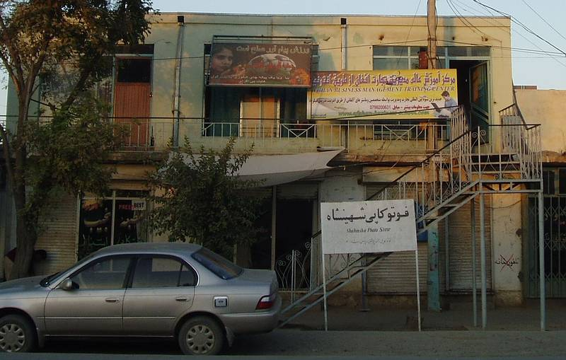 Gebäude der Afghan Business School in Kunduz dar (die erste Fernuniversität Afghanistans)